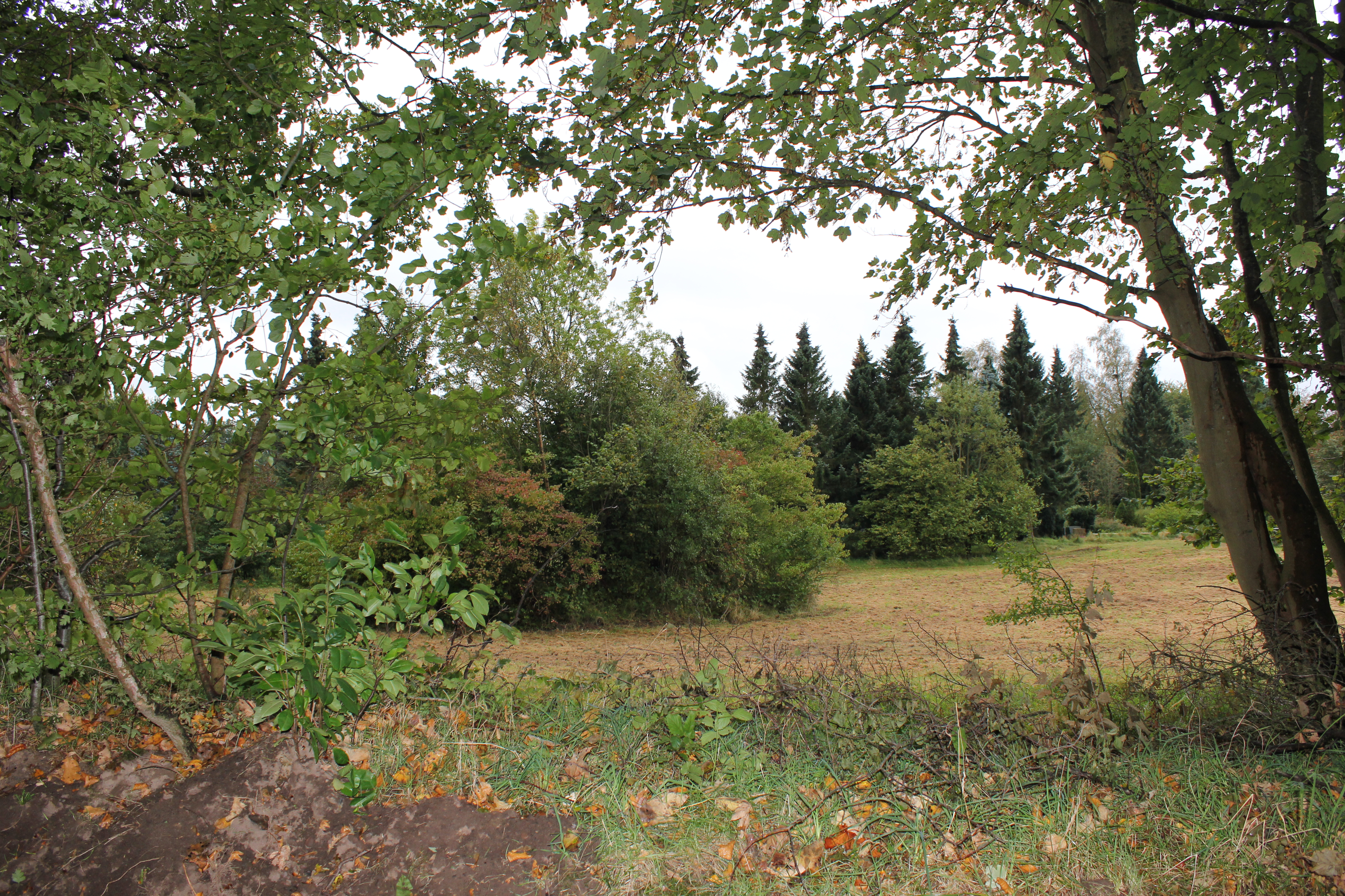 Flensburg-Adelby 2011, Brachliegendes ehemaliges Getreidefeld, gleich neben dem Friedhof, gegenüber der KGS und neben dem Weg Stille Liebe (ost)